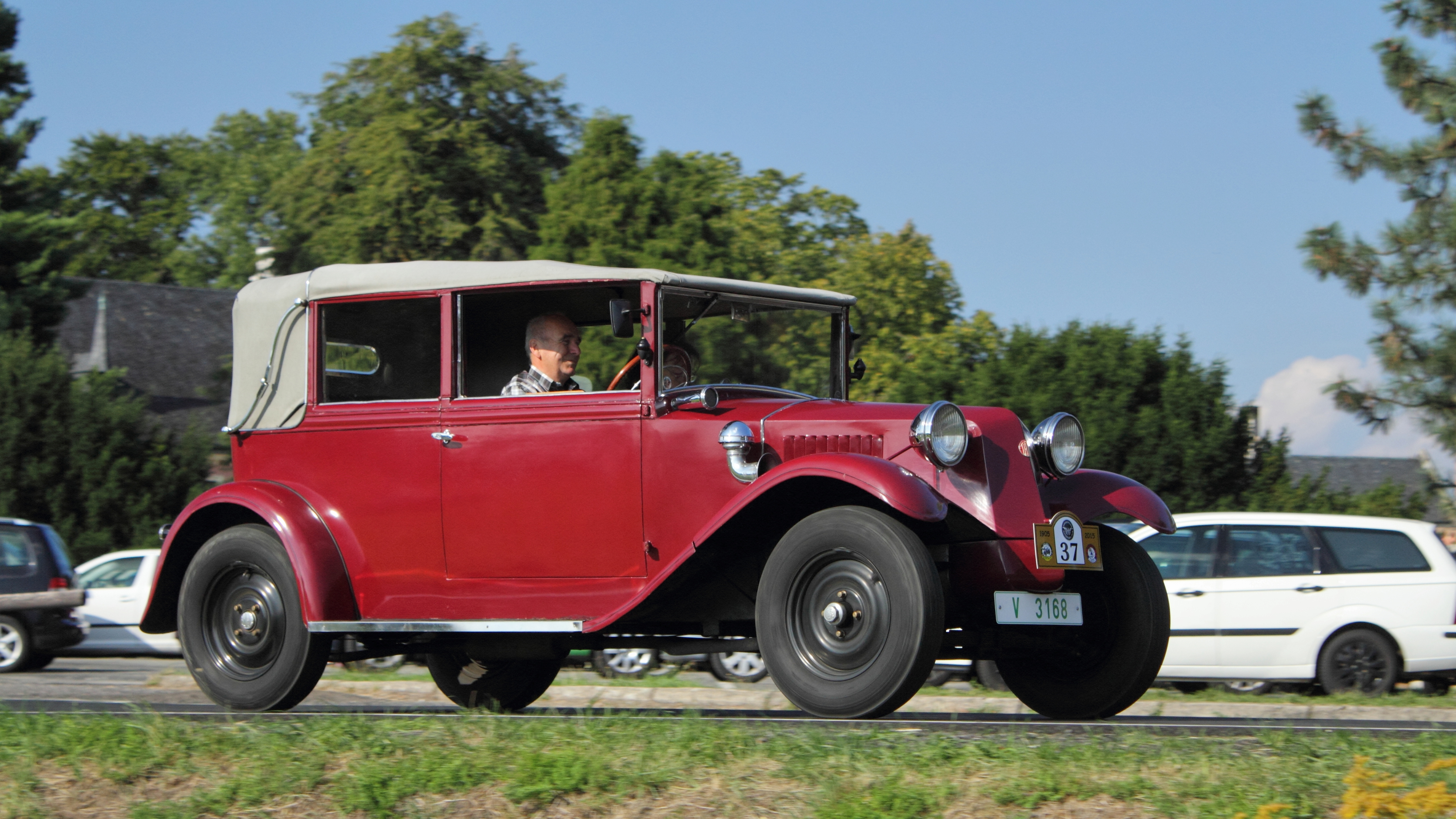 Tatra 52, 110 let založení autoklubu v Liberci